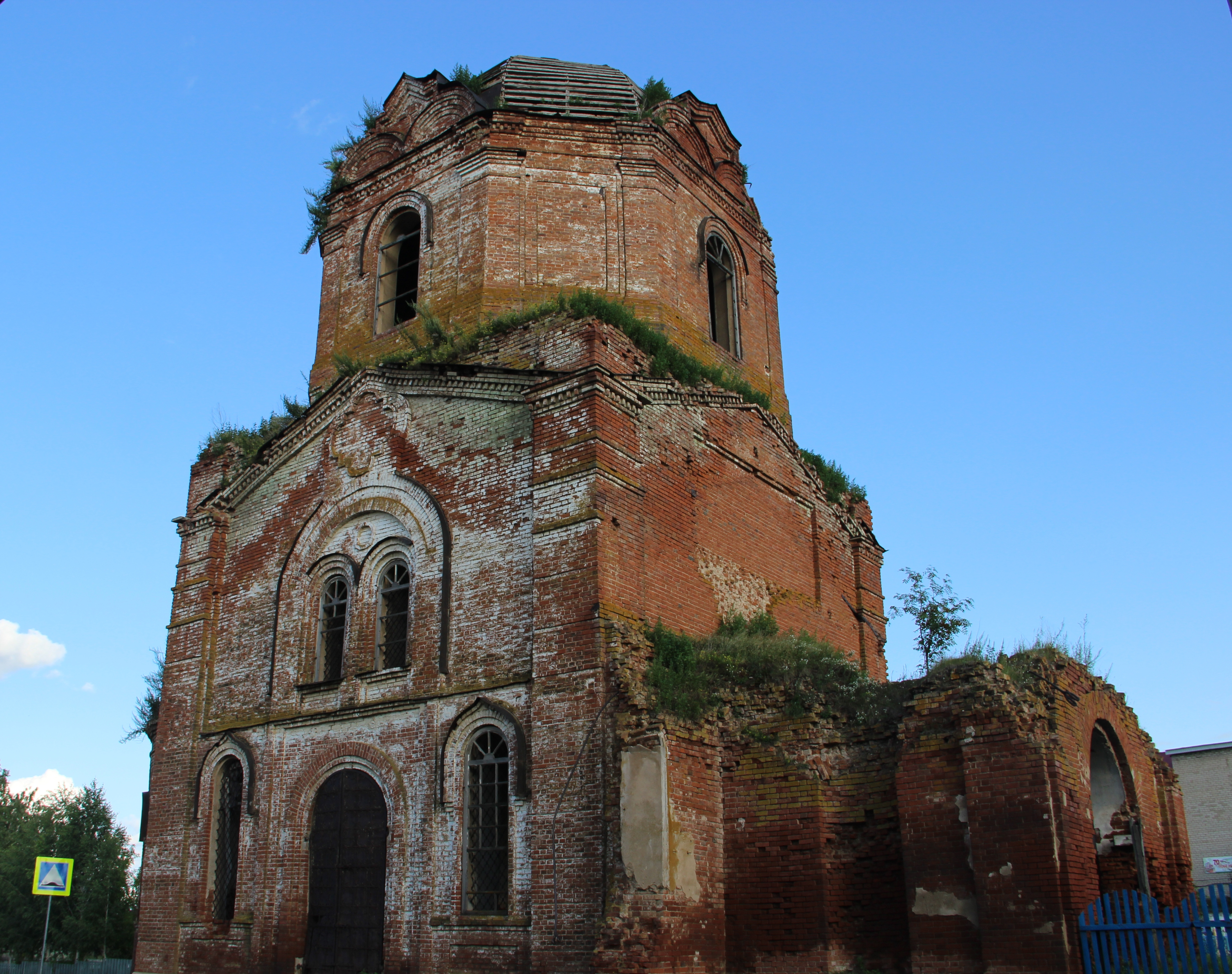 Вид со стороны улицы. Церковь Троицы Живоначальной. Слобода Екатерининская. Новошешминский р-н. РТ. Июль 2015